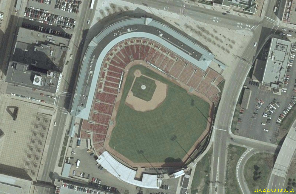 Image satellite du Dunn Tire Park de Buffalo provenant du logiciel Nasa World Wind (USGS).